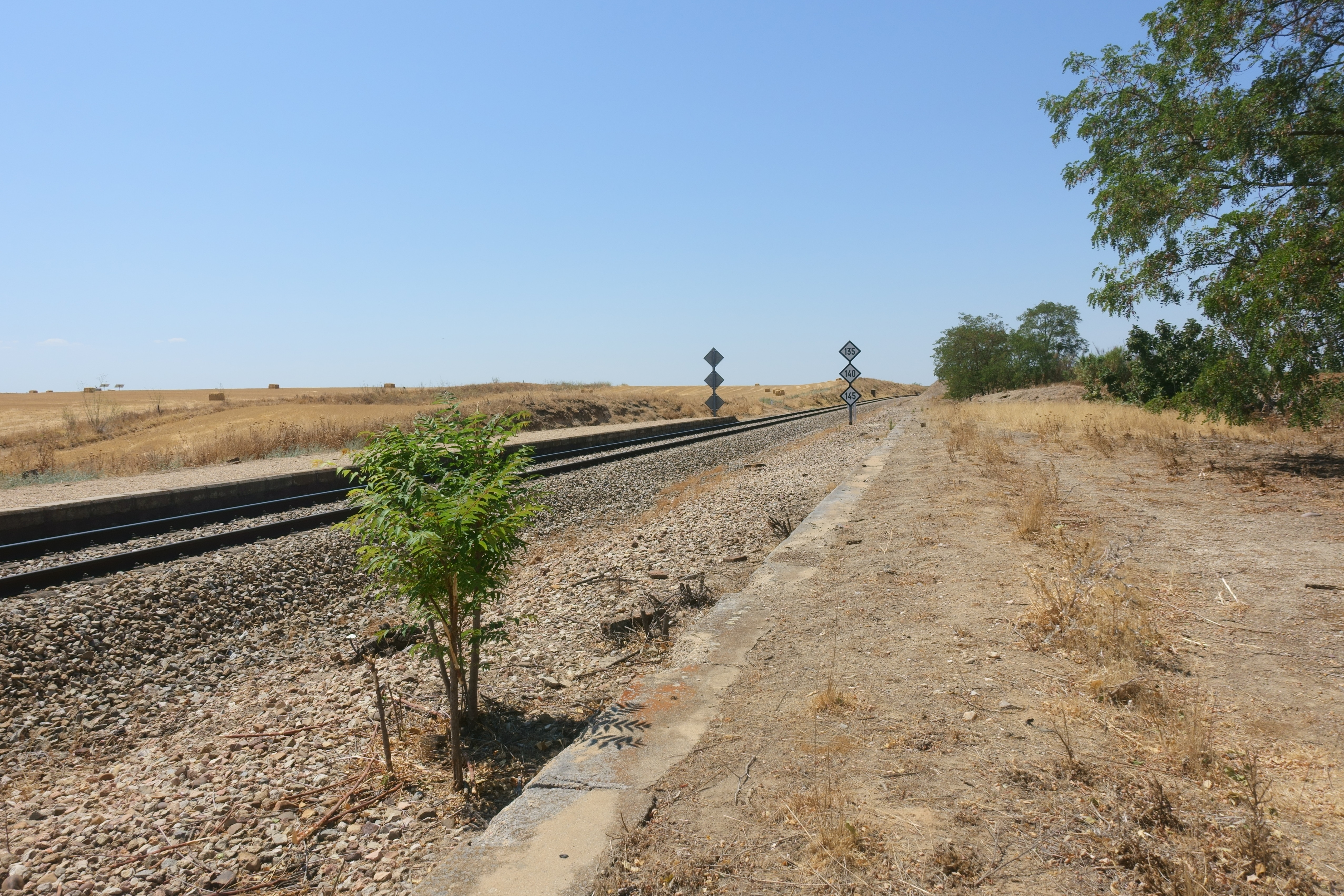 Lugar donde se localizaba la estación de ferrocarril de Illán de Vacas-Cebolla (Toledo, España).